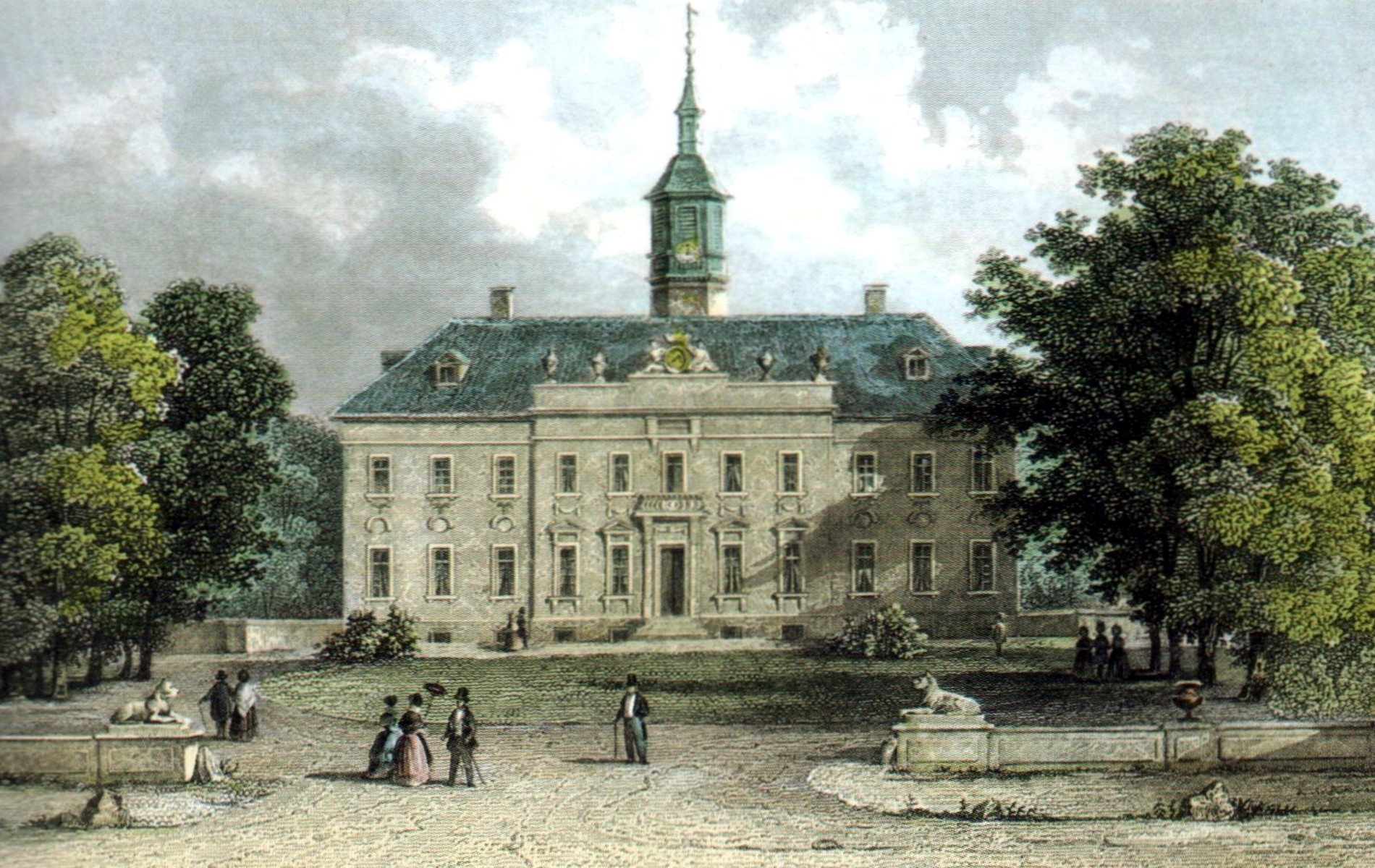 Nordansicht des Wandsbeker Schlosses mit Attika und Turm, im Vordergrund die Löwen (heute am Wandsbeker Marktplatz), kolorierte Lithografie von C. Laeisz